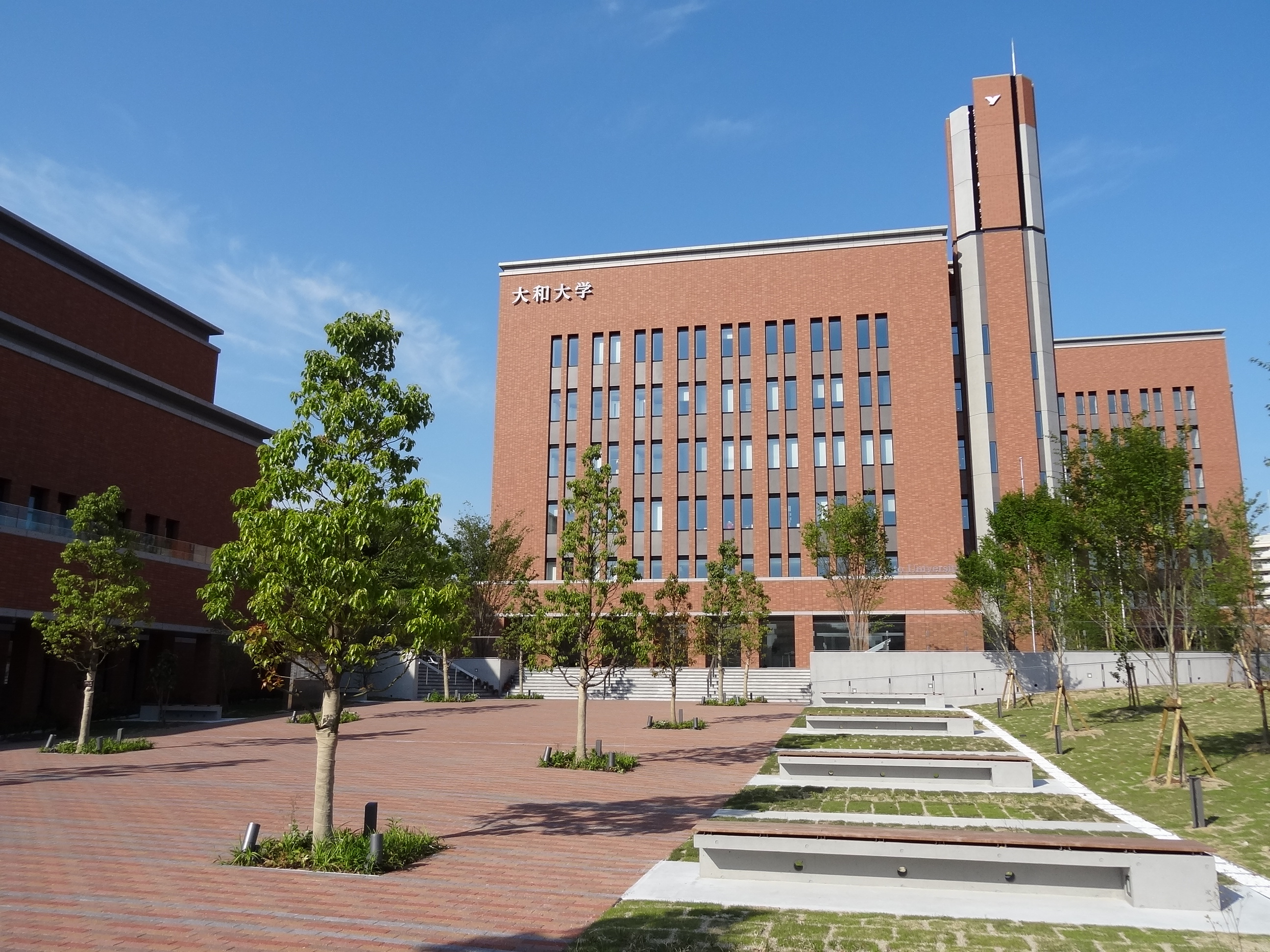 大和大学の前庭から学舎を望む。左手前は厚生棟、中央は管理棟、右奥は講義棟。